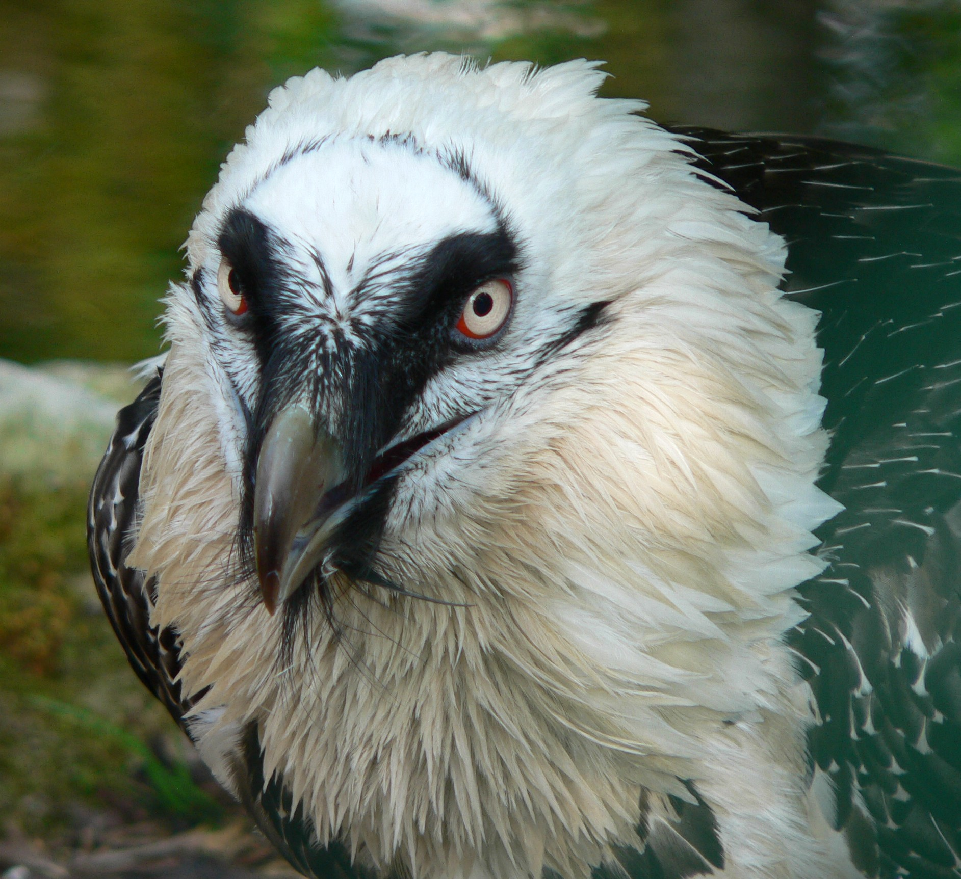 Gypaetus barbatus Mai 2005 Benutzer:Else2